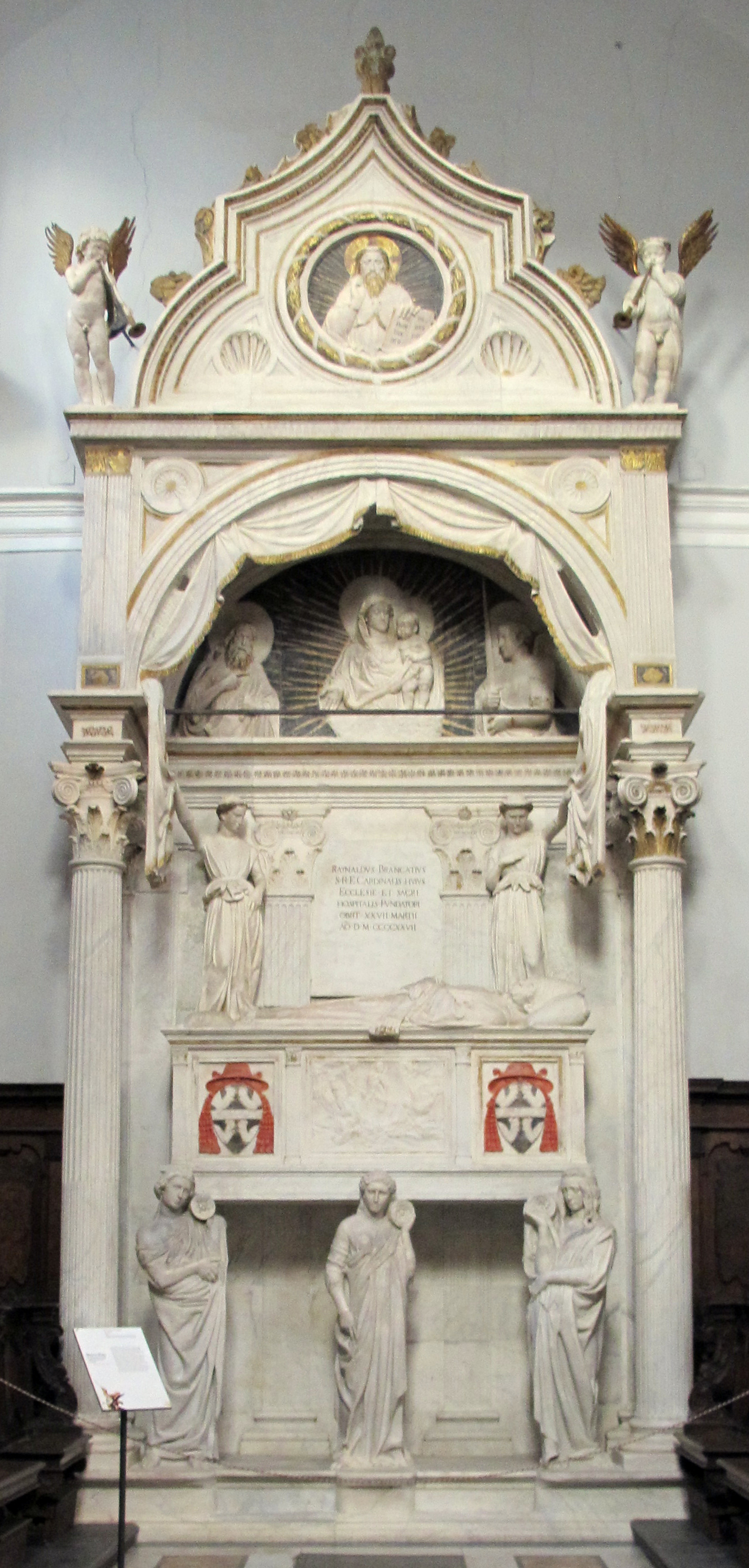 Napoli